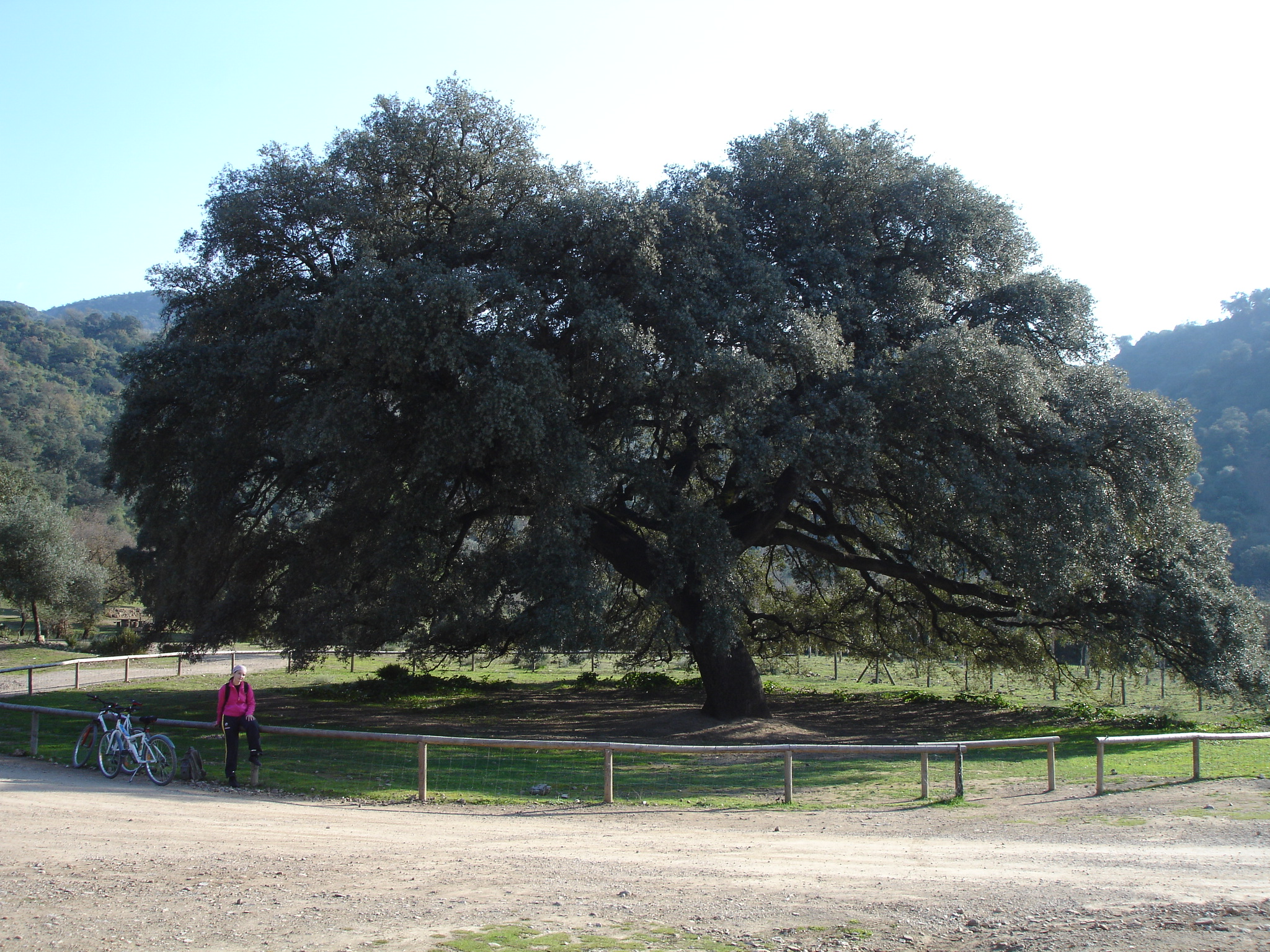 Ejemplar de más de 200 años de antigüedad (13 m de altura y 30 m de diámetro) de Chaparro de la Vega, con persona y su bicicleta junto a la cerca para mejor apreciar el tamaño.